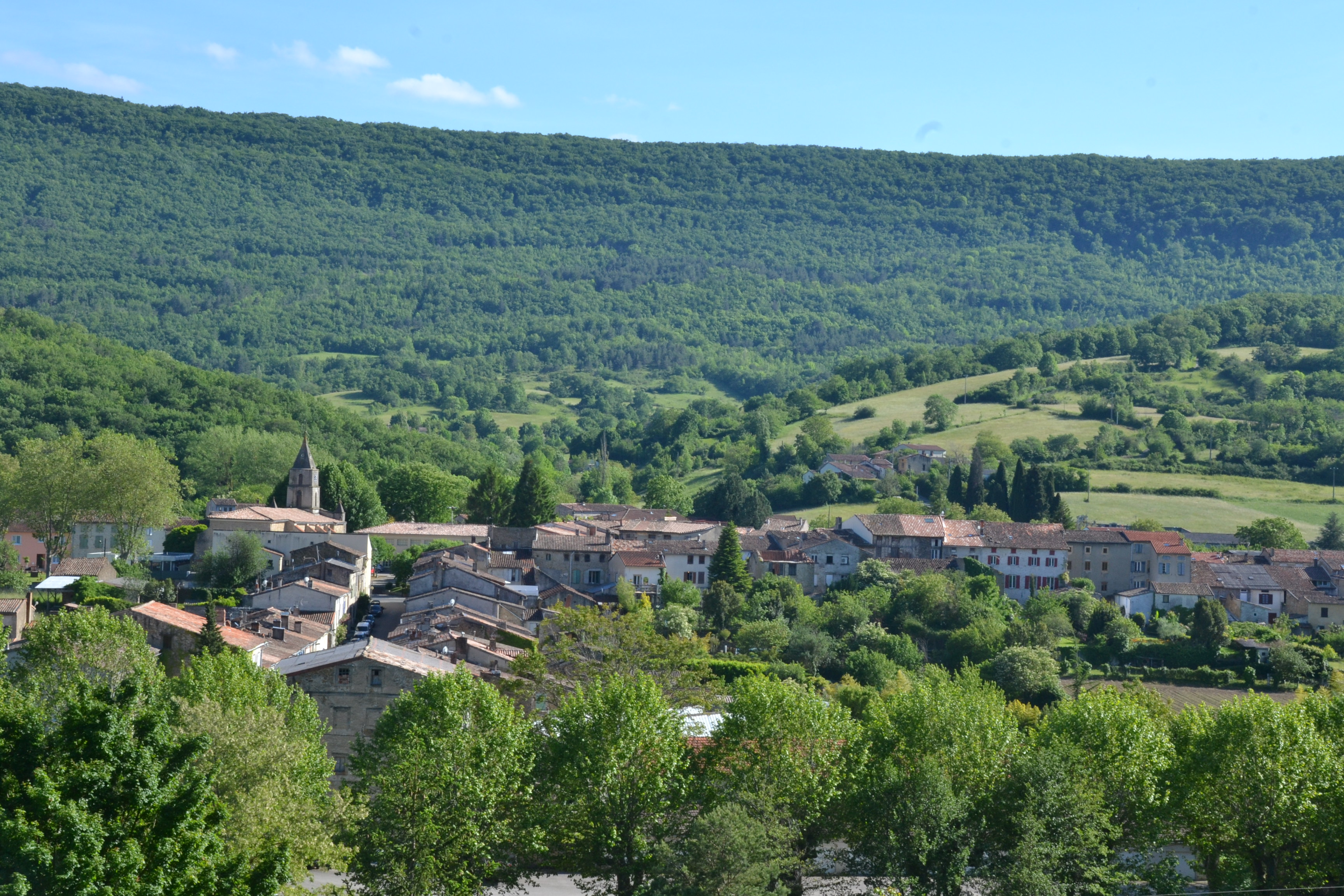 Sainte-Colombe-sur-l'Hers (Aude, France).